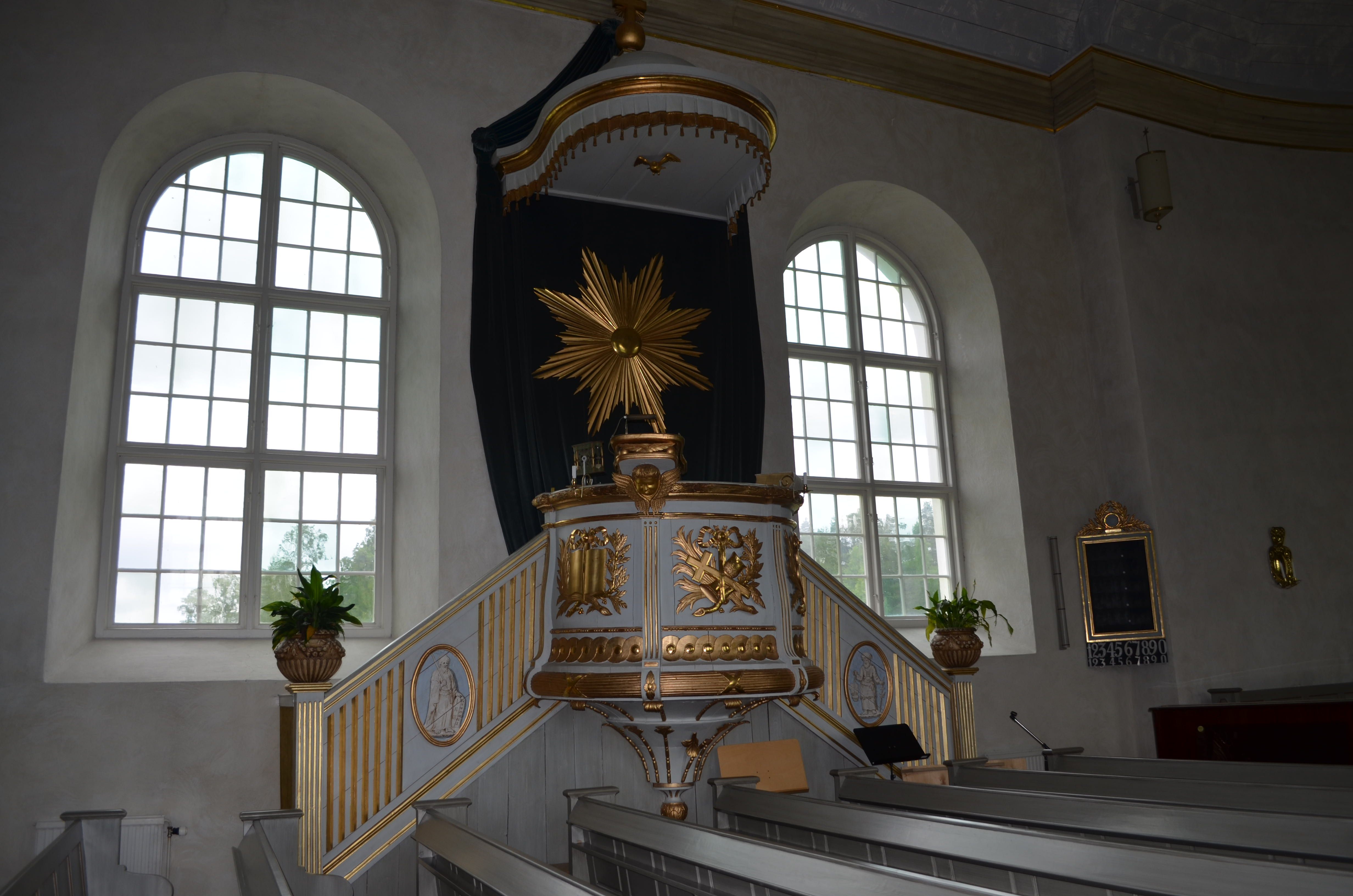 Predikstolen